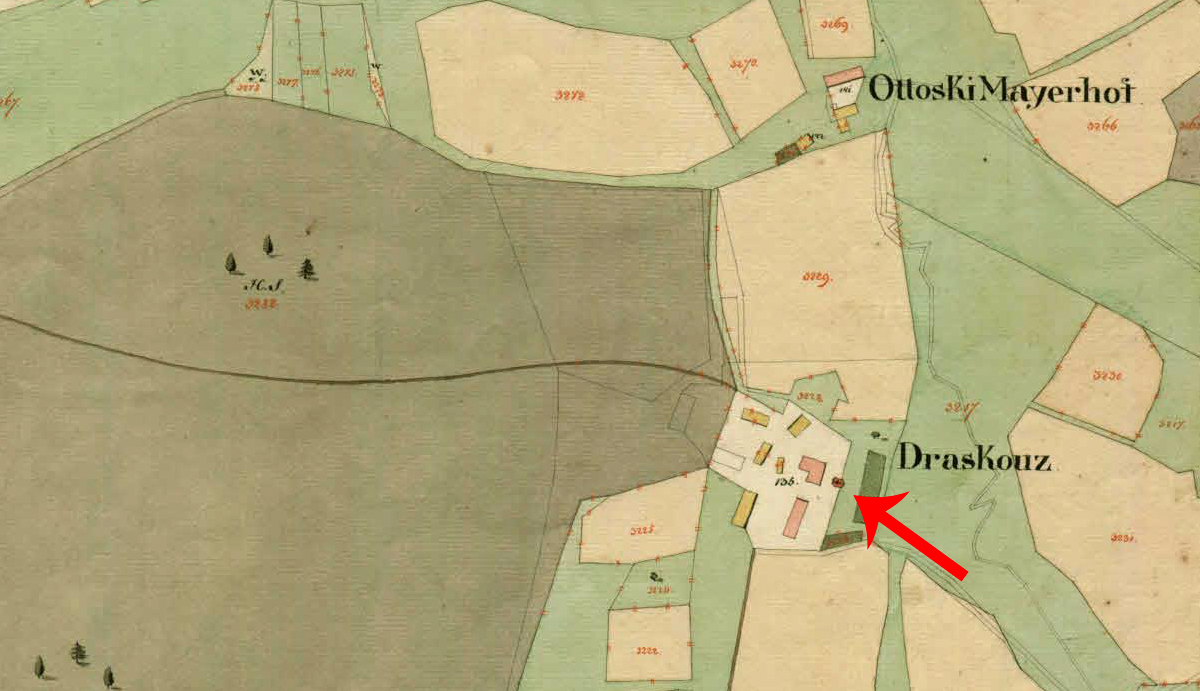 Franciscejski kataster za Kranjsko, 1823-1869